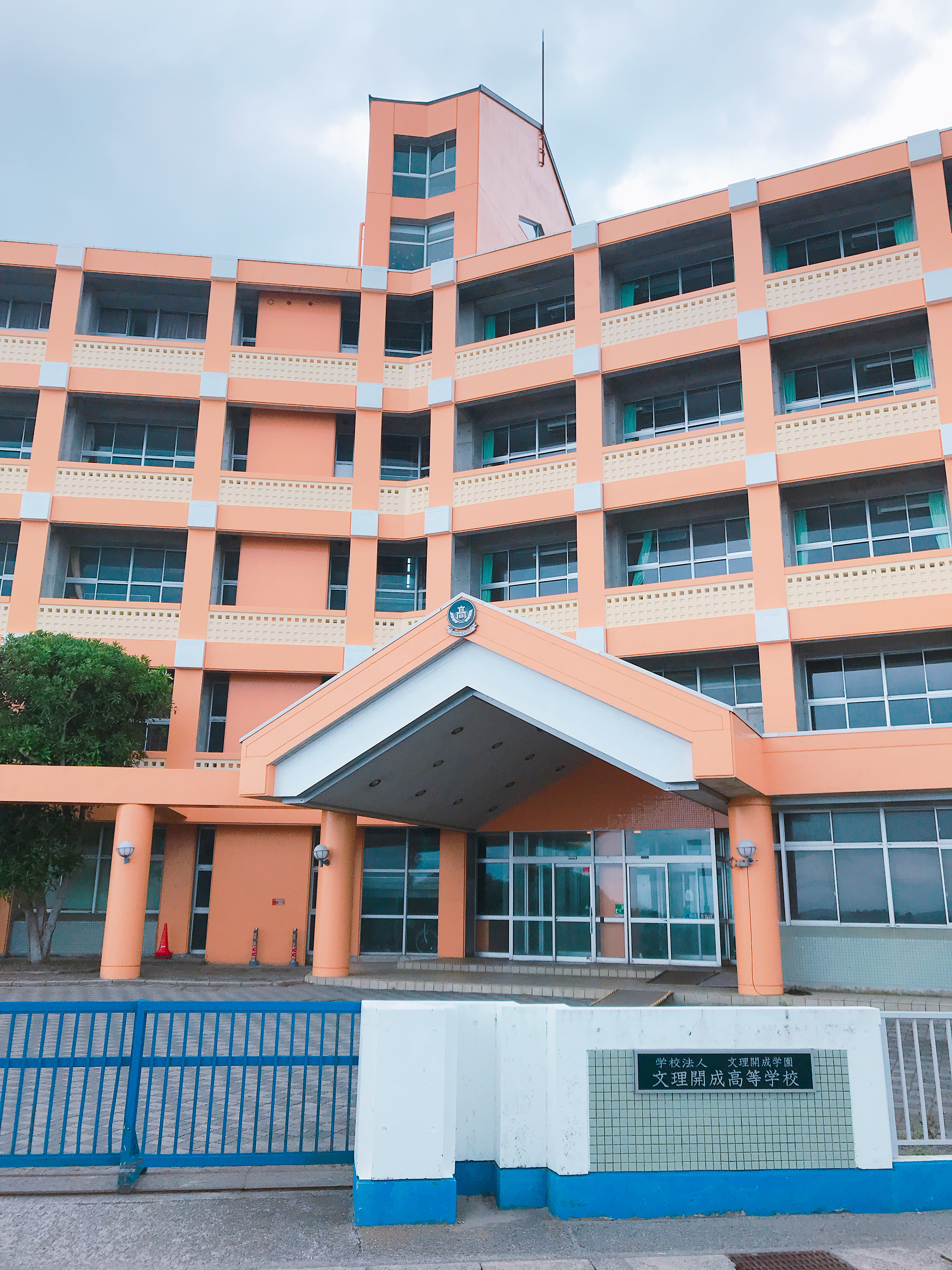 文理開成高等学校の校舎を正面側から撮ったものです。